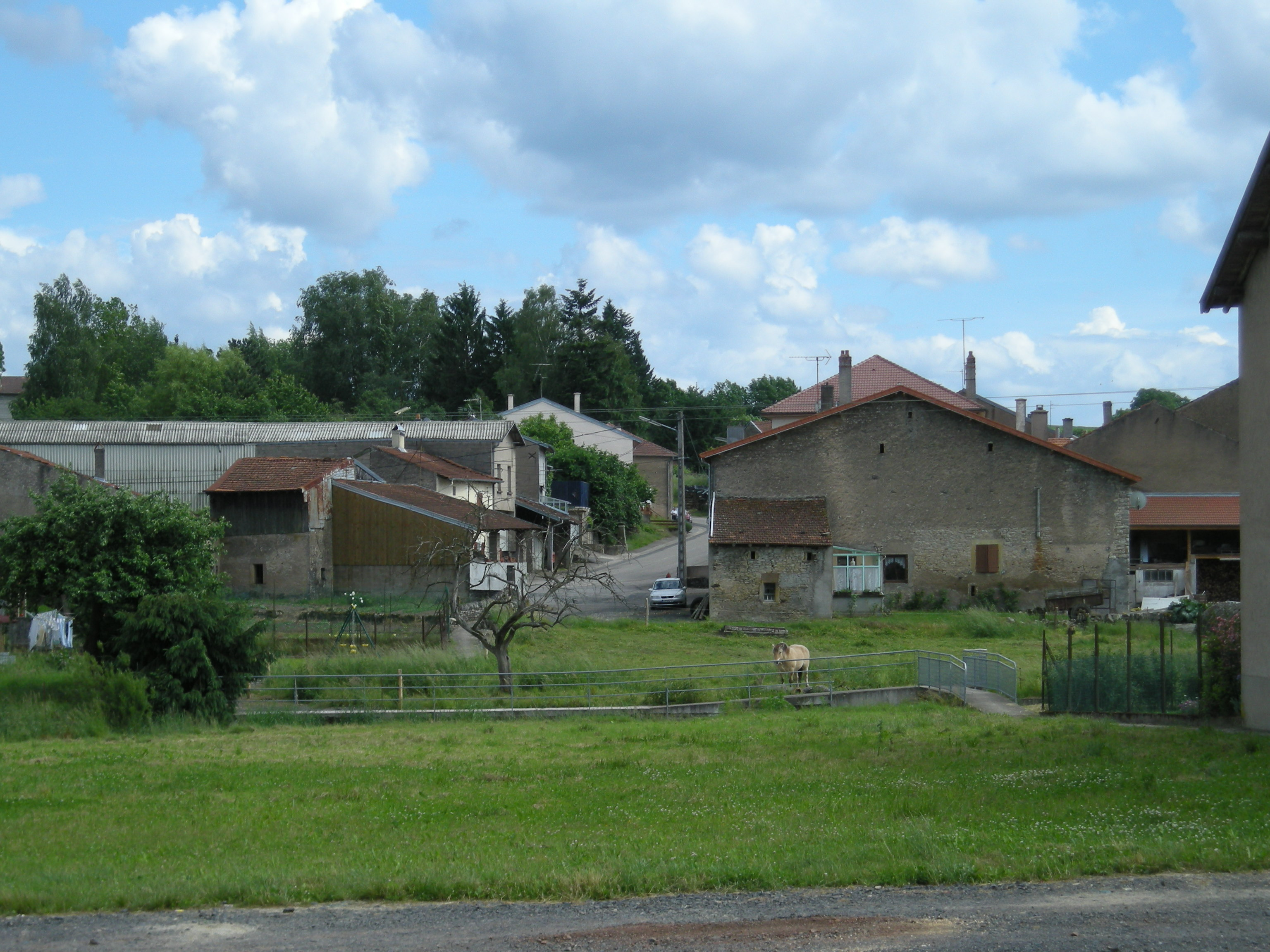 Vue de Glonville (Meurthe-et-Moselle)